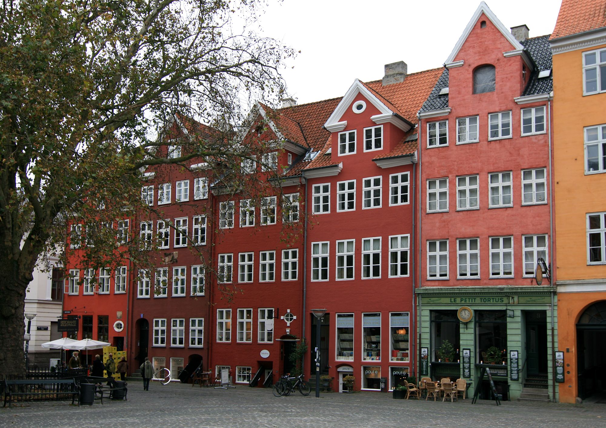 Gråbrødretorv, København. Fra venstre: Fiskebløderhuset (nr.1), bygget 1800. Wessels Hus (nr.3), bygget 1732. Nr.5, bygget 1731. Nr.7, bygget 1728. Nr.9, bygget 1729. Alle fredet. I nr.3 boede den norske digter Johan Herman Wessel mellem 1760 og 1780.